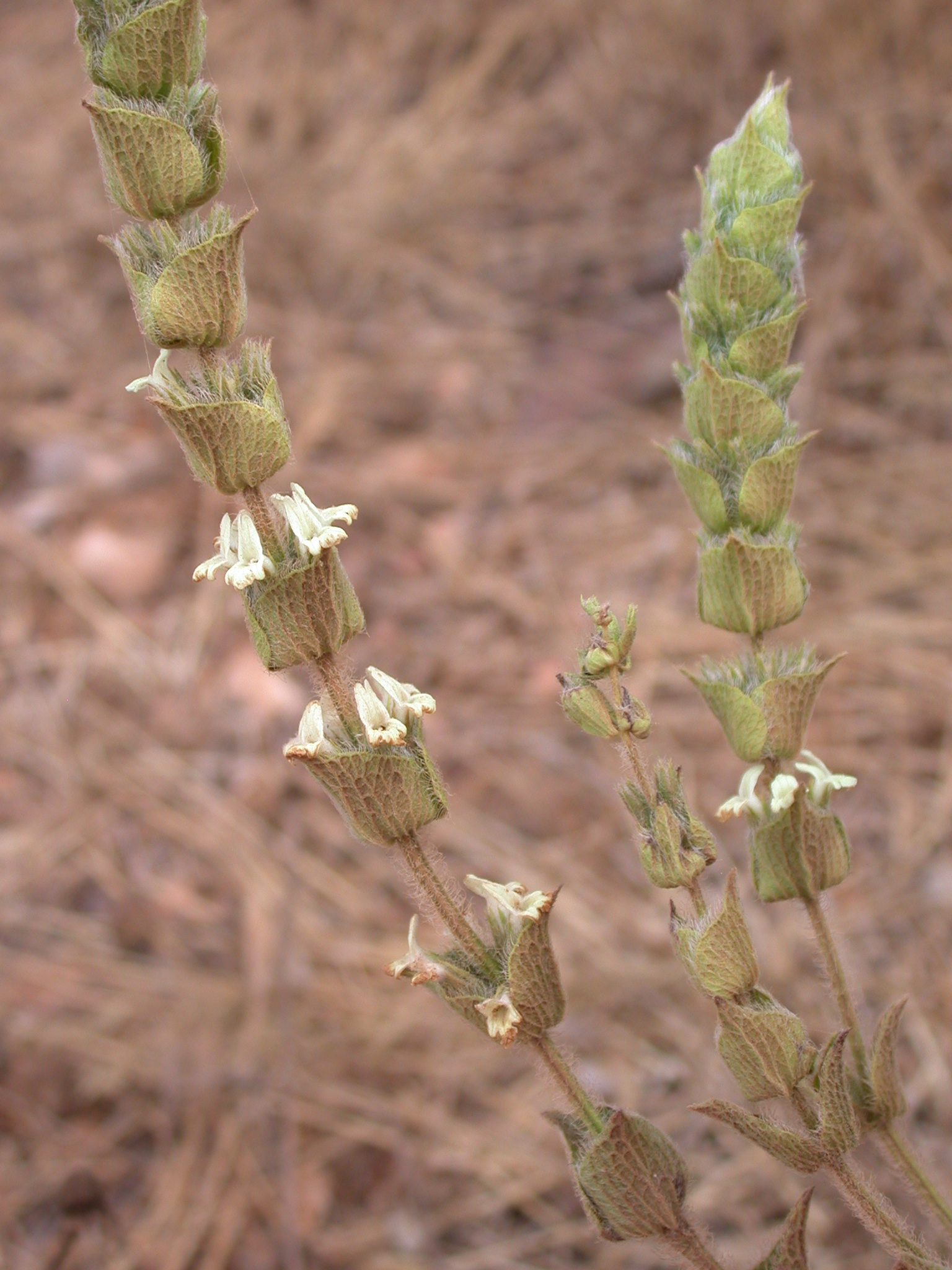 Sideritis perfoliata L. (ברזילון ריסני), Mount Carmel, Israel, June 8, 2008.